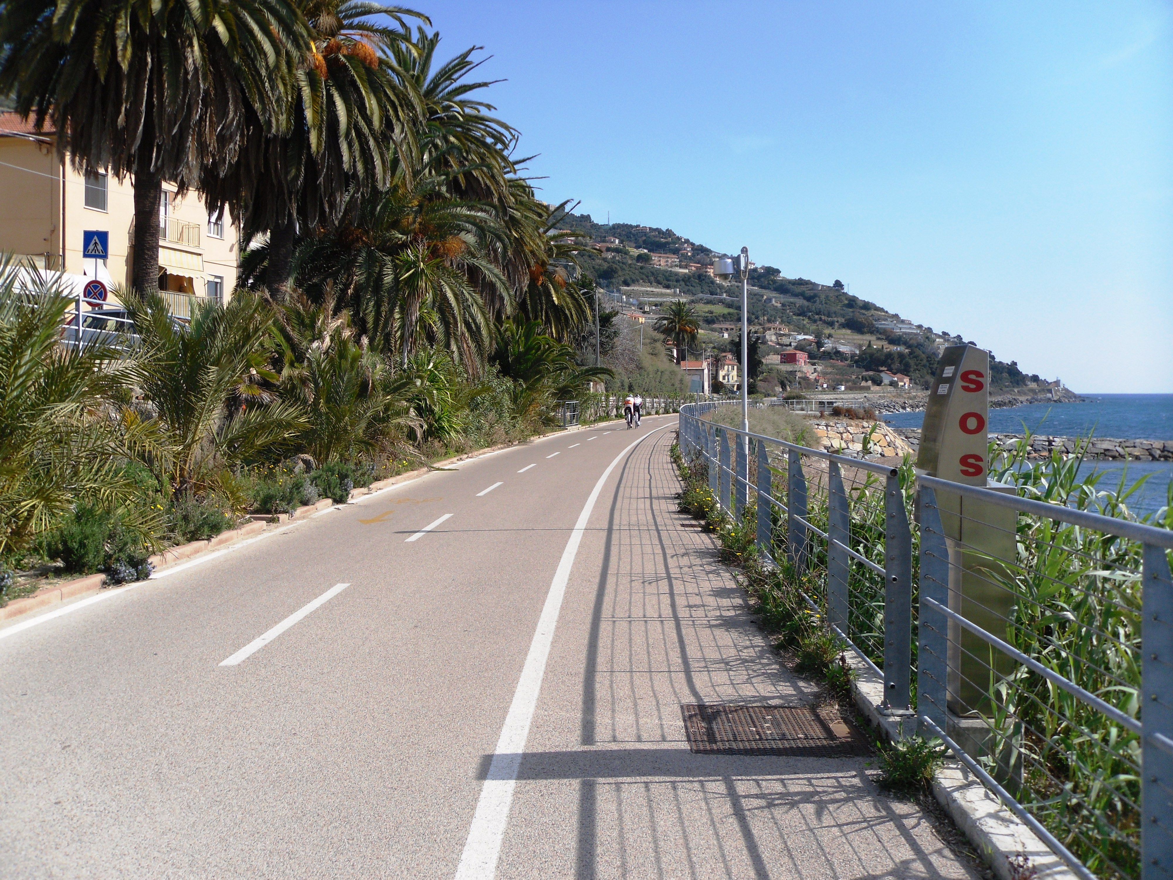 Pista Ciclabile San Lorenzo al mare Sanremo